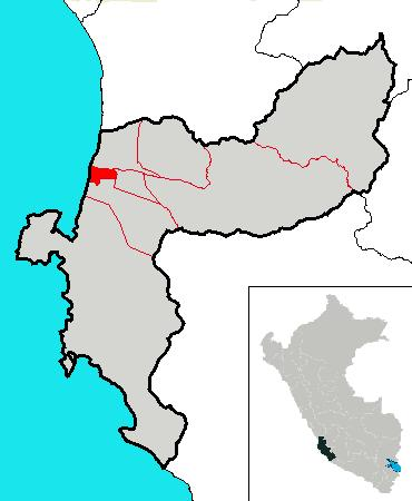 Ubicación del distrito de Pisco , en la provincia de Pisco , en la Región Ica.